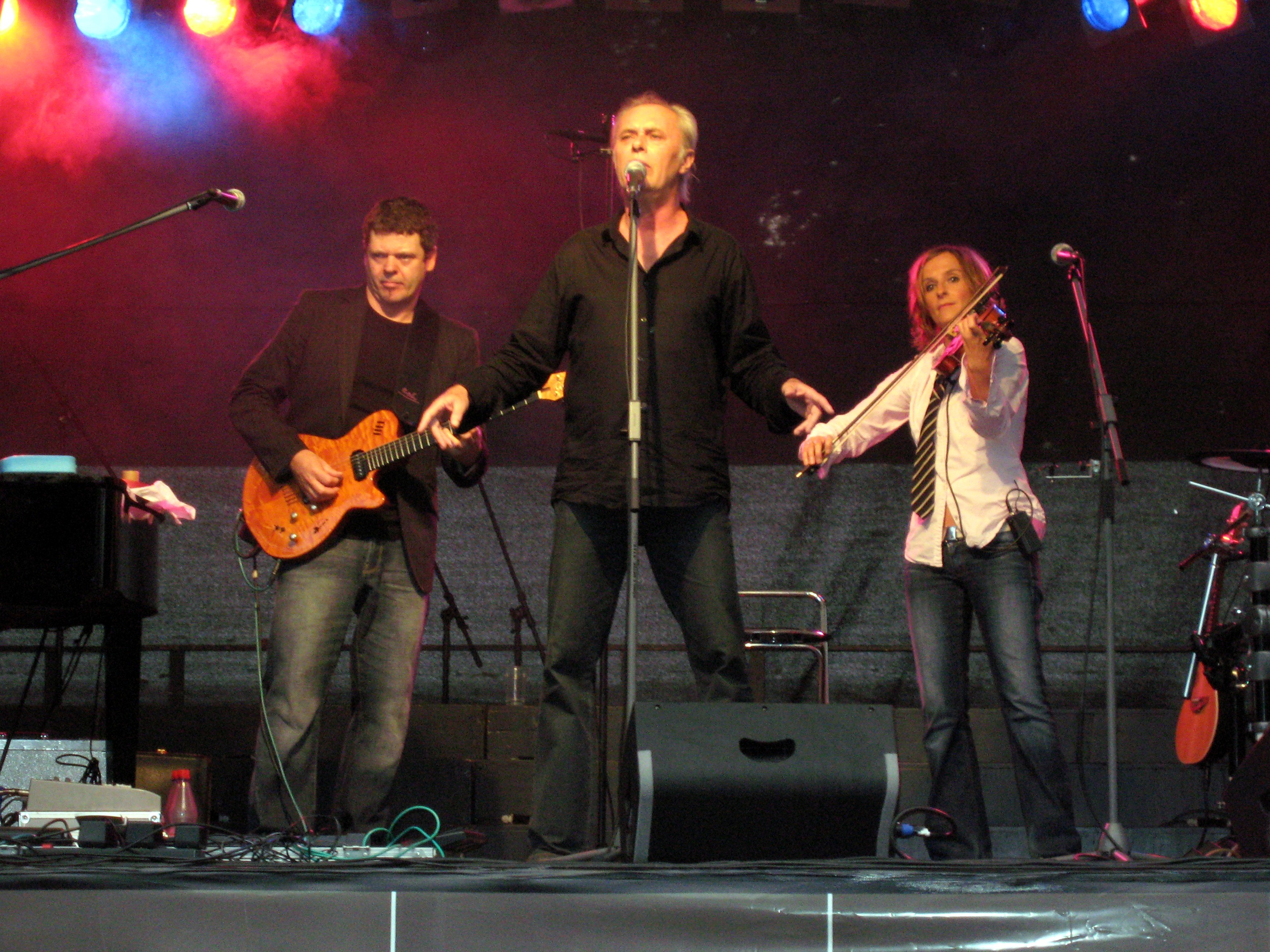 Auftritt der Gruppe LIFT beim Inselleuchten-Festival 2008 in Marienwerder, Landkreis Barnim (Brandenburg) Die abgebildeten Künstler stimmten der Veröffentlichung in einem persönlichen Gepräch nach dem Konzert zu.